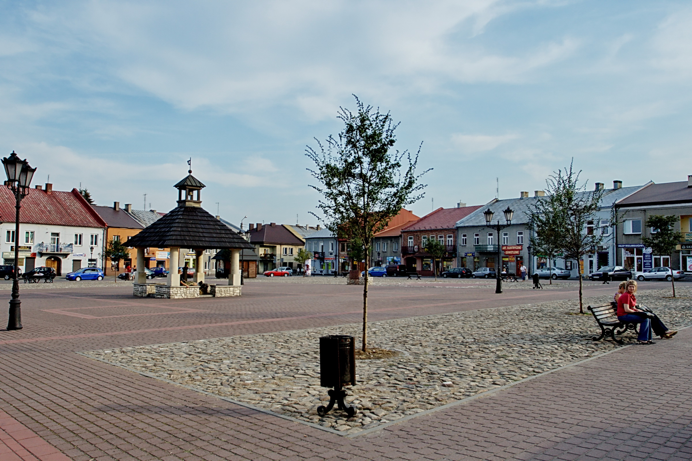 Pilica